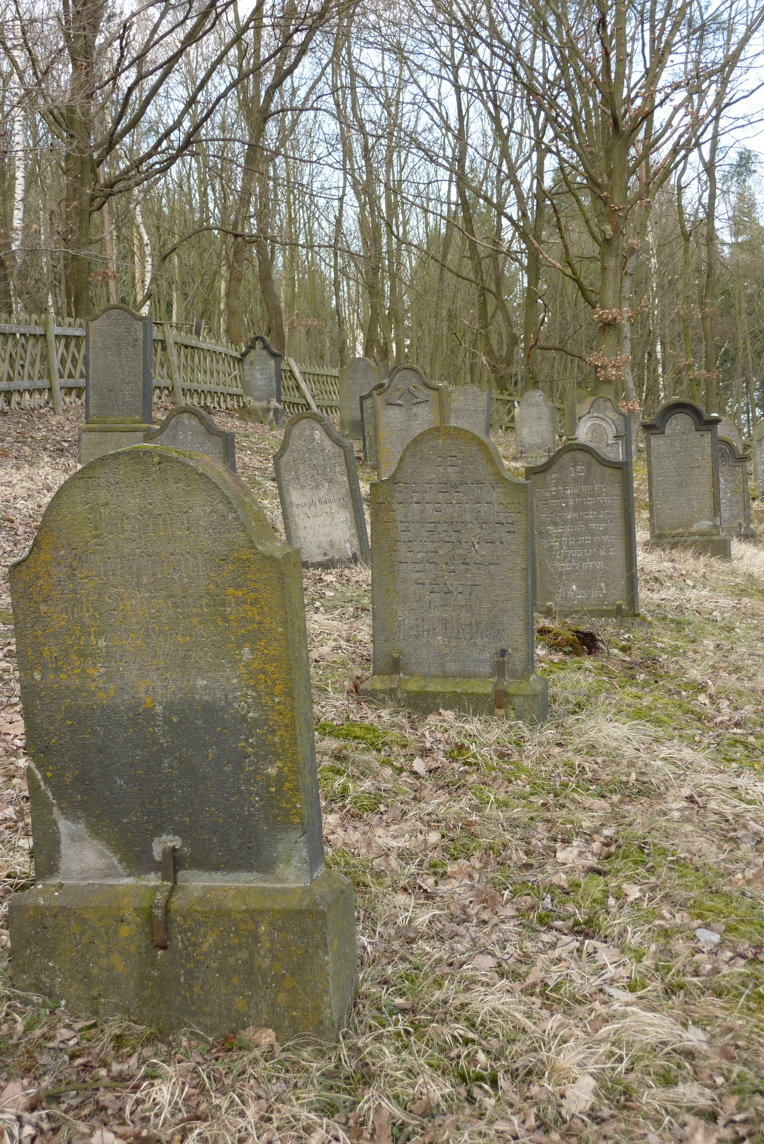 Jüdischer Friedhof Kruft, im Wald